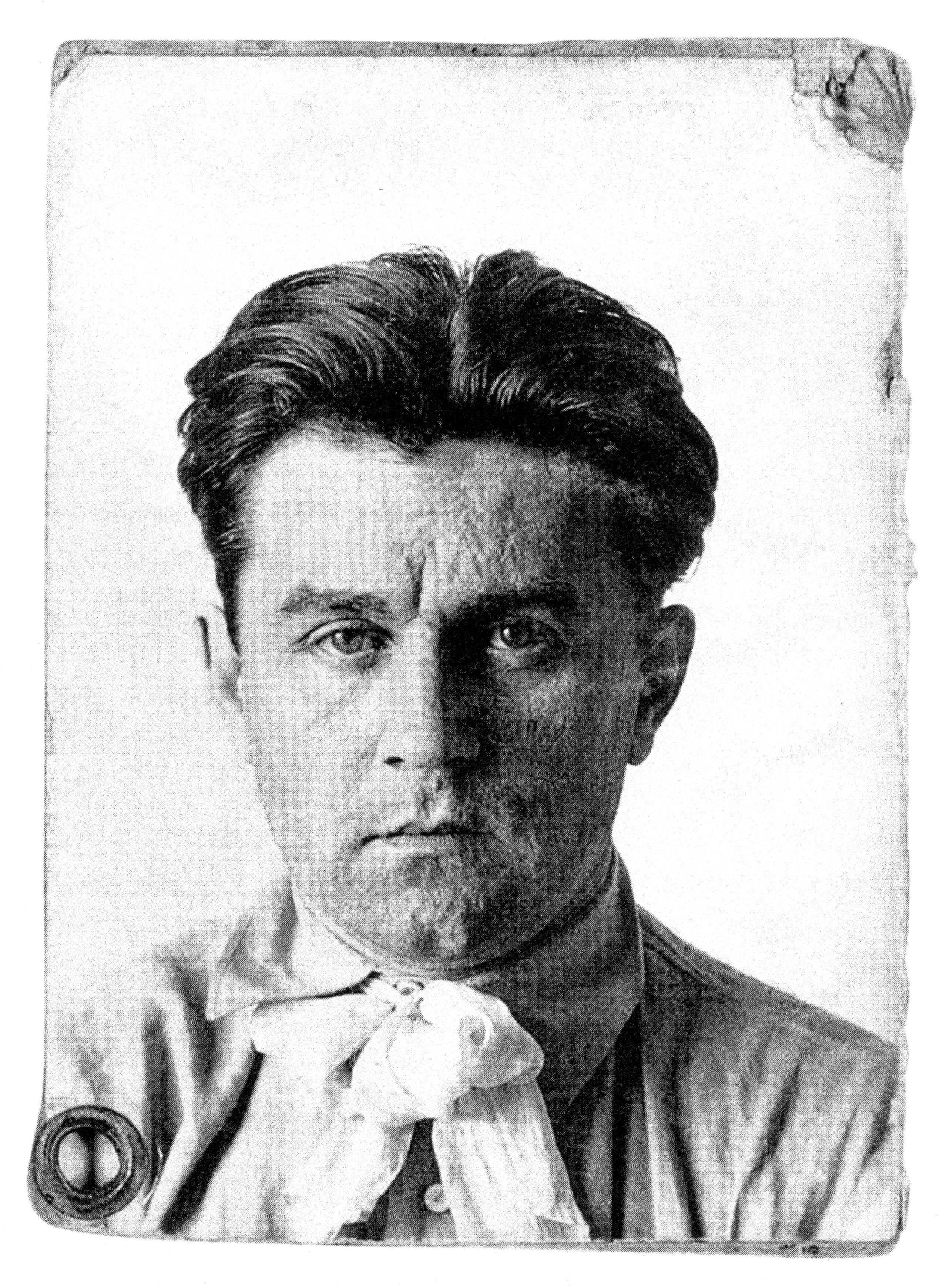 Фотография Казимира Малевича. 1910-1911